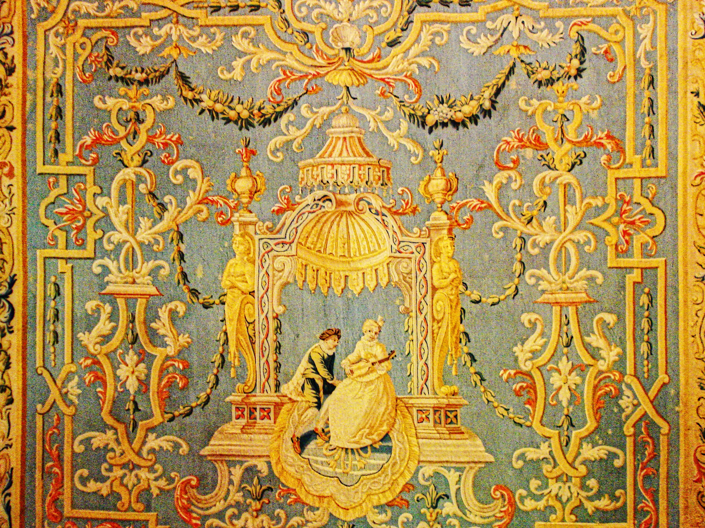 Wandteppich im "Morgenländischen Bau", Sanspareil, Deutschland